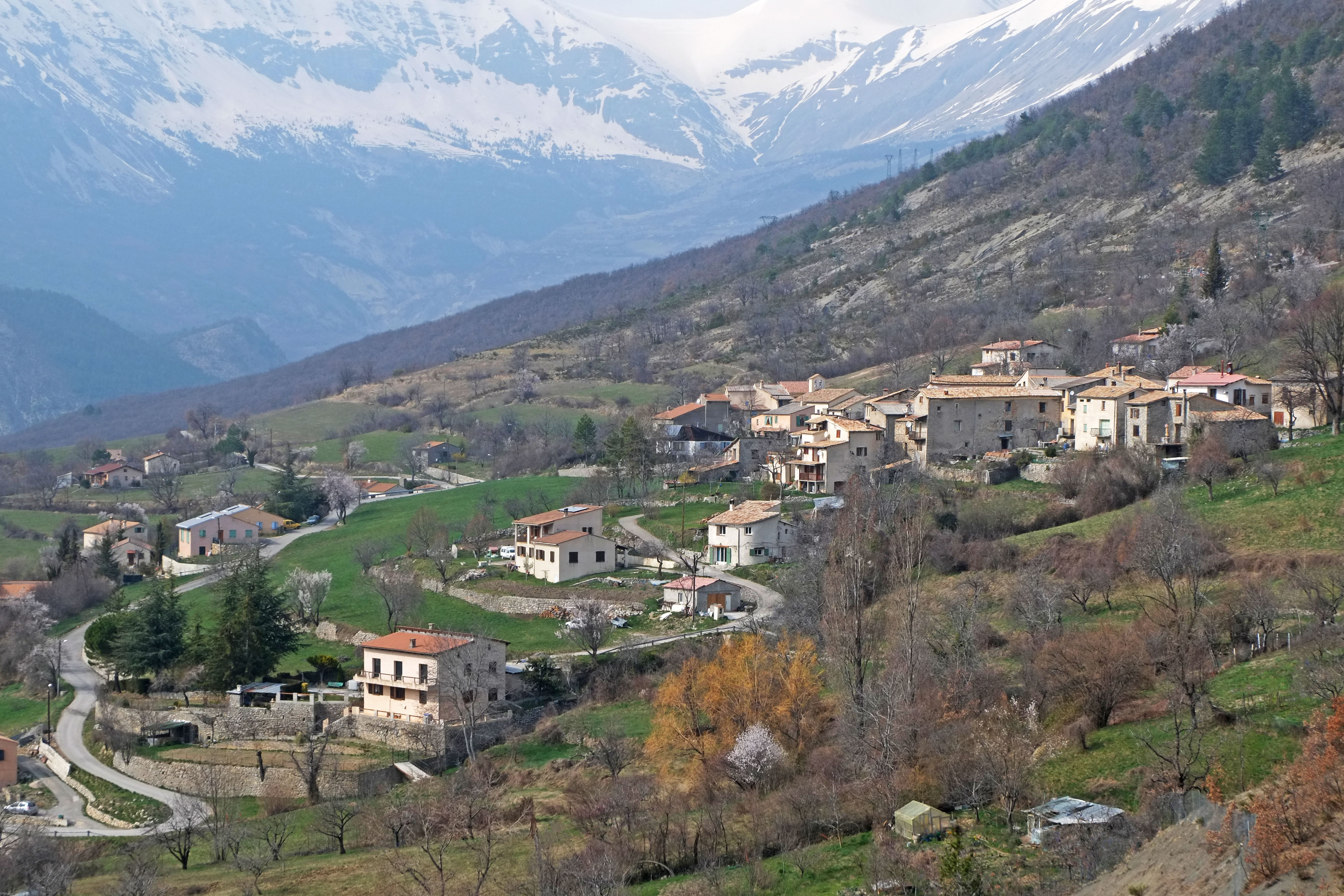 Vue du village de Saint-Léger en venant du col éponyme